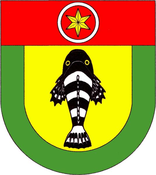 Znak obce Pulečný